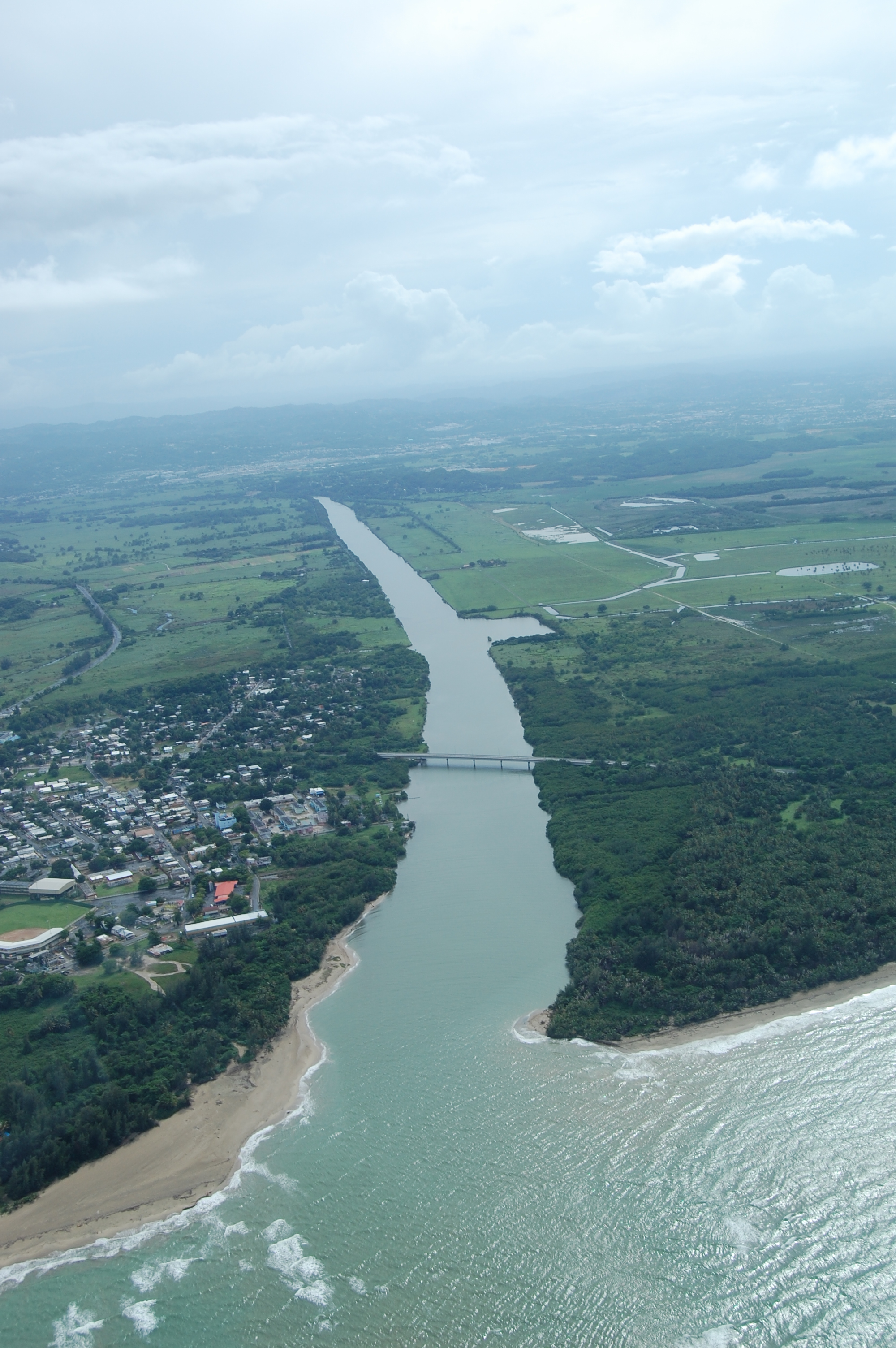 Río Grande de Loíza (Loiza River). Loiza, Puerto Rico